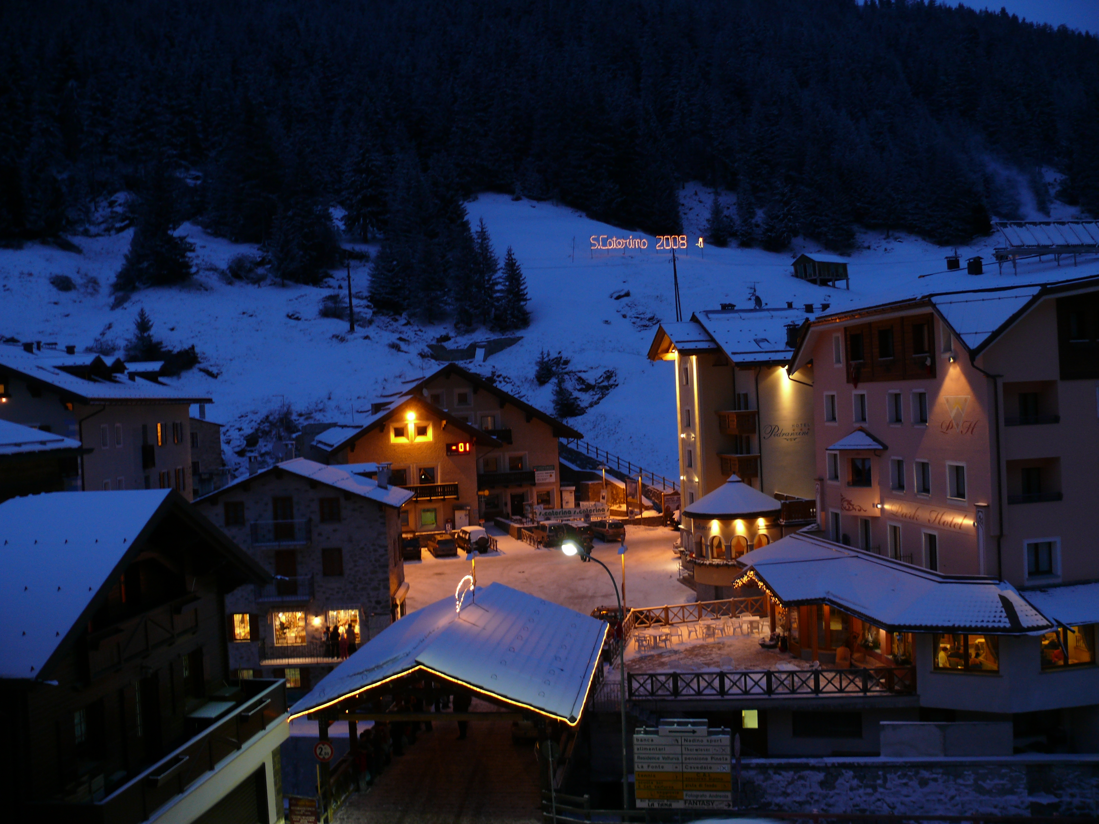 Santa Caterina Valfurva, provincia di Sondrio, Italia